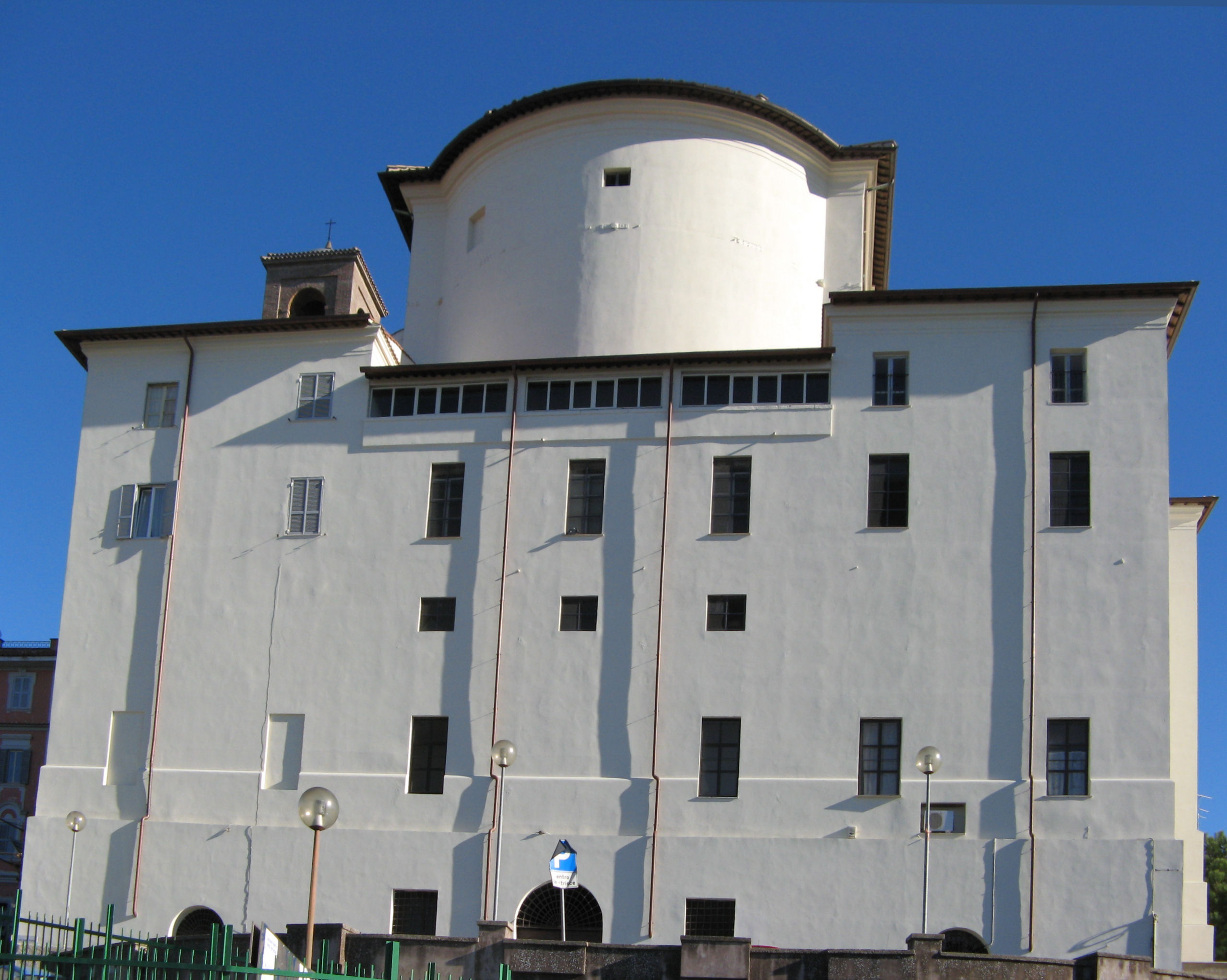 Genzano di Roma, Collegiata della SS Trinità, Parte abside dall'esterno